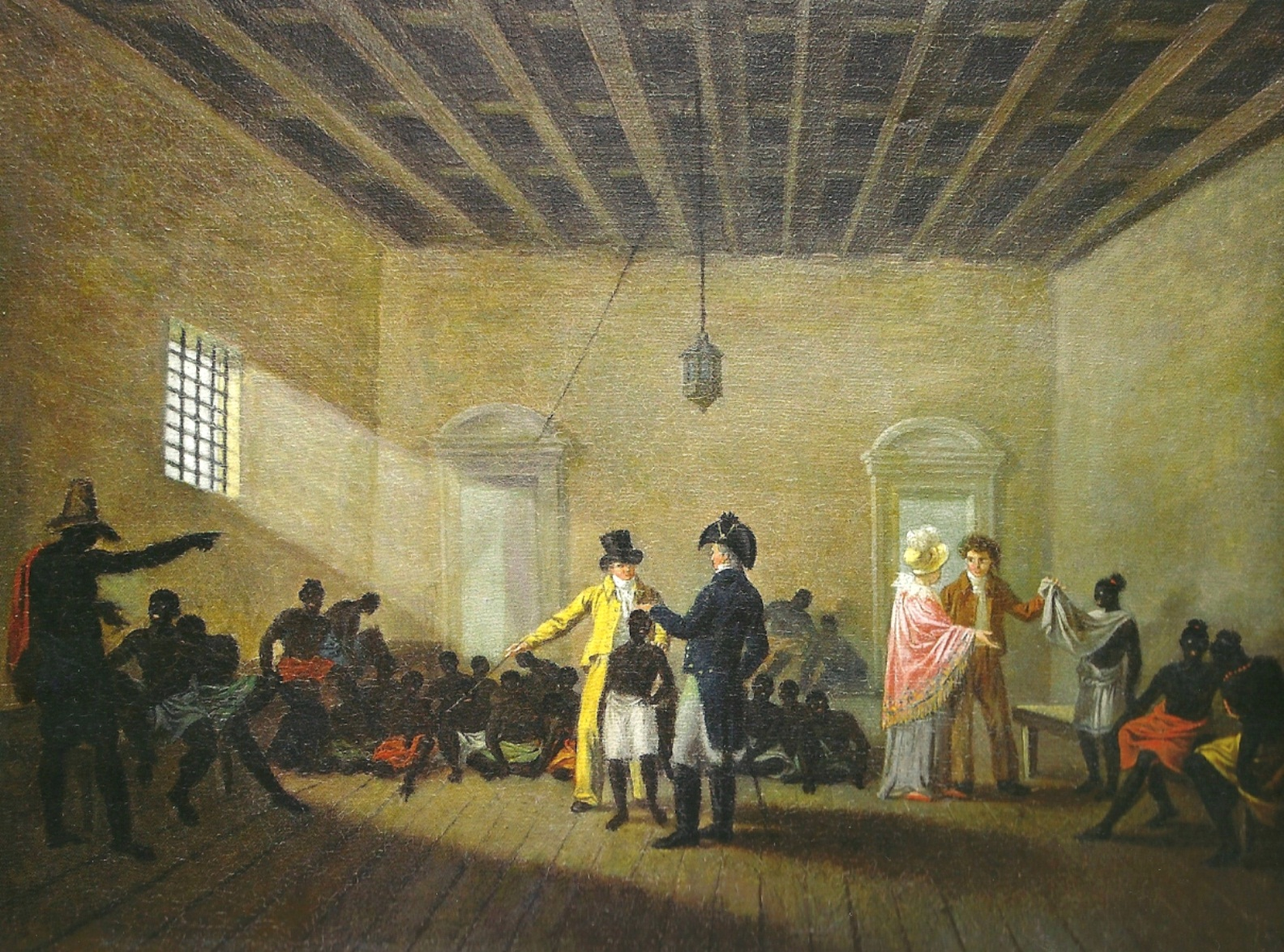 mercado de escravos da rua do Valongo, Rio de Janeiro século 19